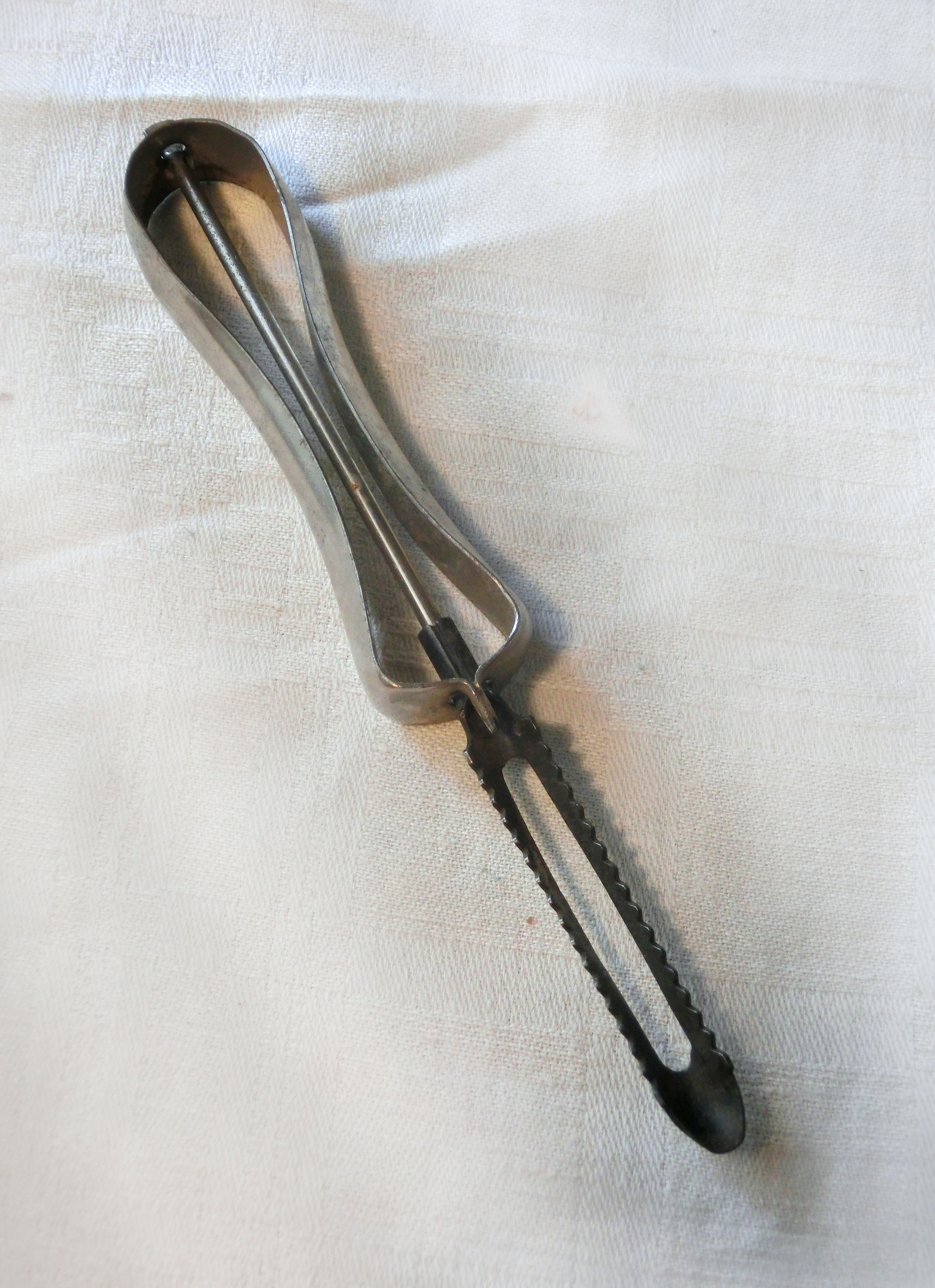 En potatisskalare av metall.